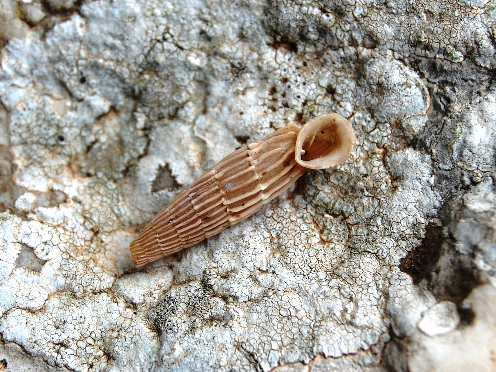 Siciliaria crassicostata - Riserva naturale Monte Cofano, Sicily